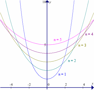 县链线 (--Created by myself--)